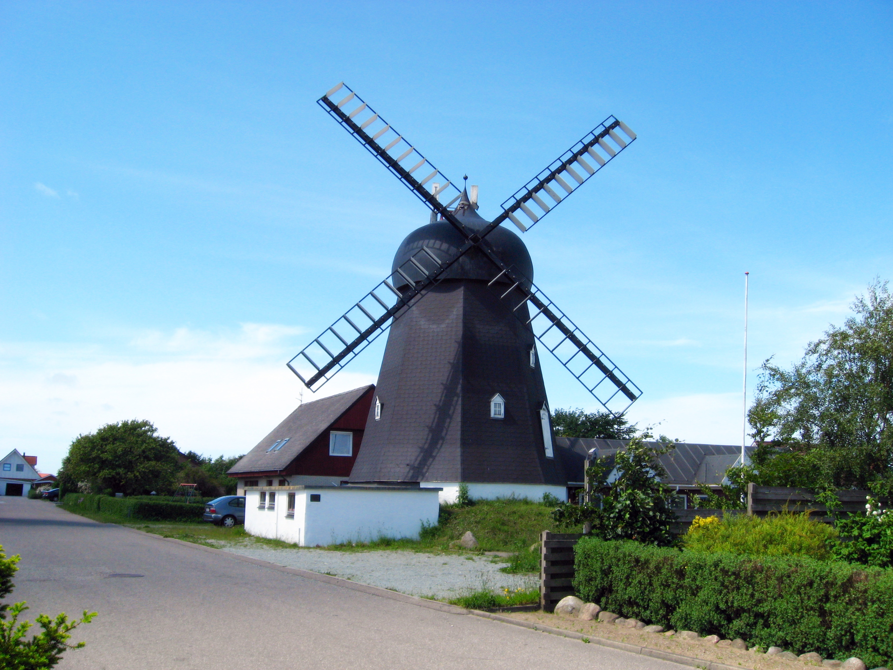 Pandrup Vindmølle ("Klostergårds Mølle")